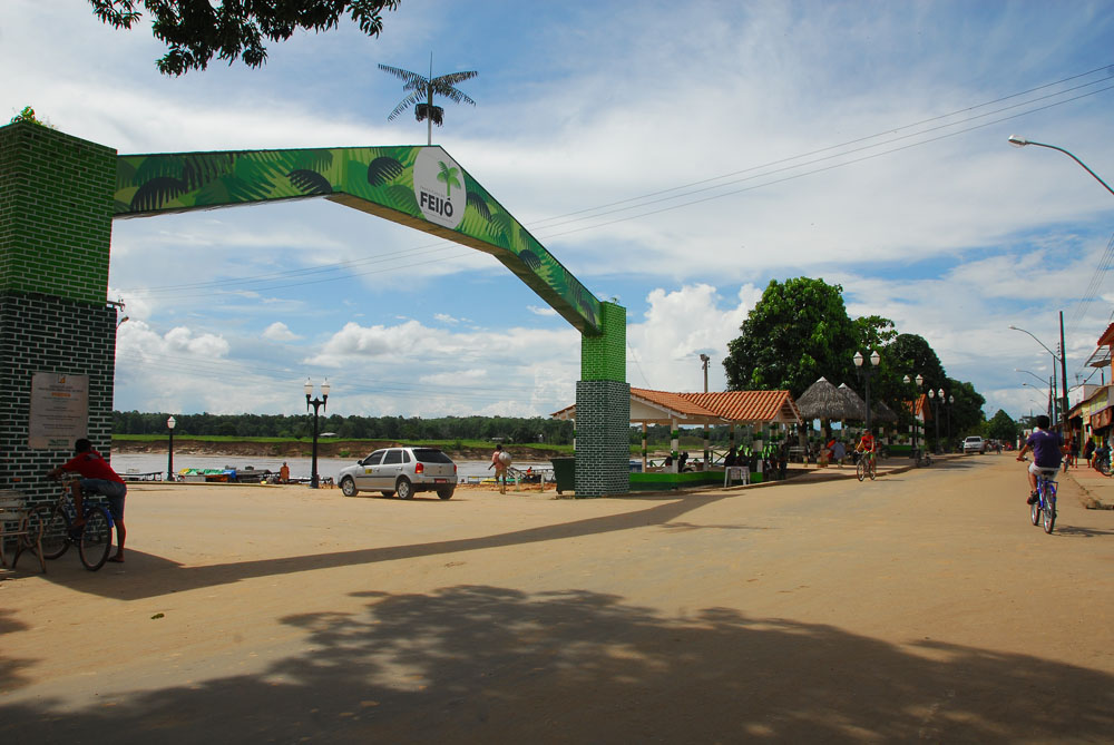 Cidade de Feijó.